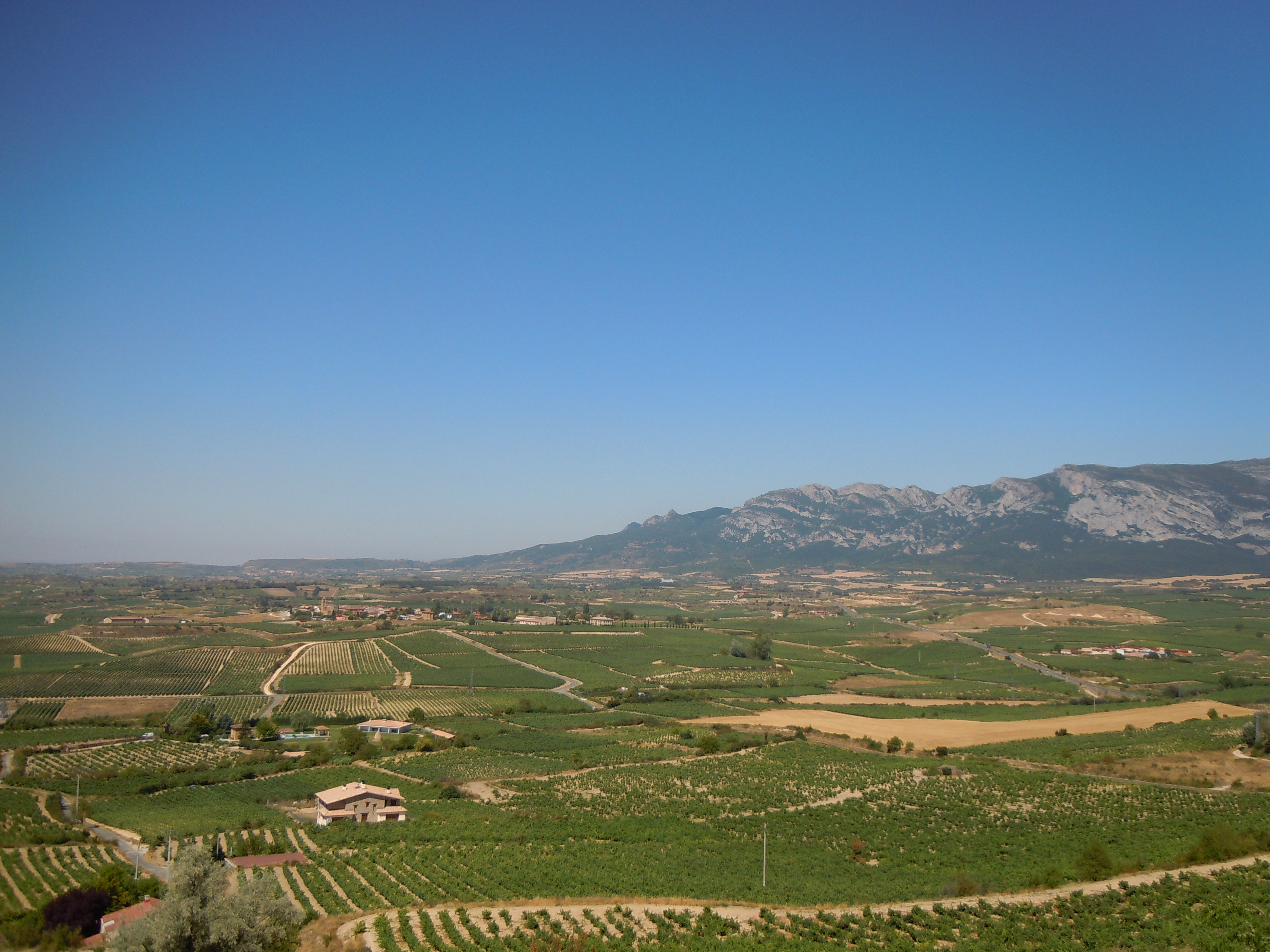 La Rioja Alavesa, Laguardia, Álava (Spain).